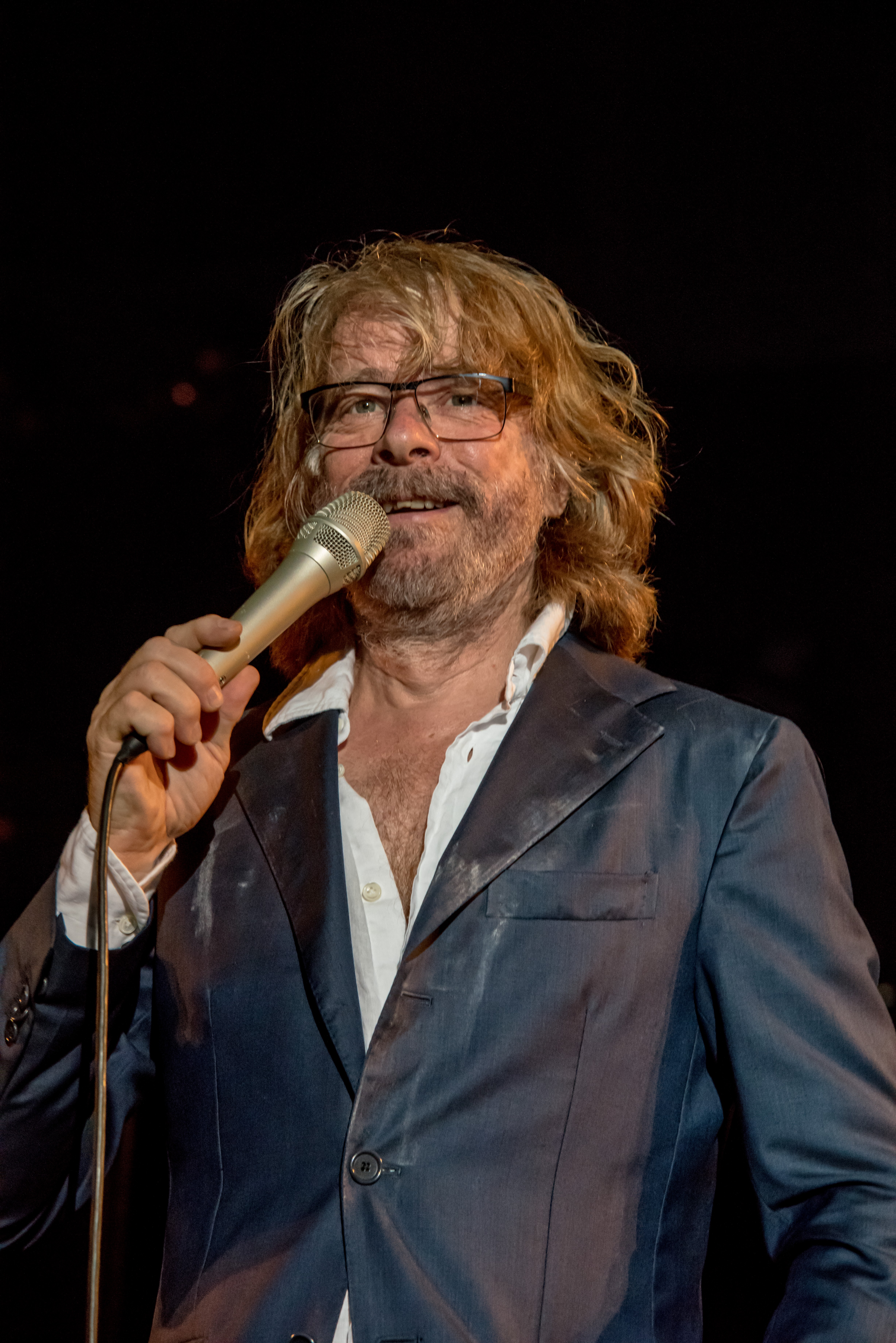 Bilder vom Zelt Musik Festival 2017 in Freiburg im Breisgau Helge Schneider am 10.07.2017